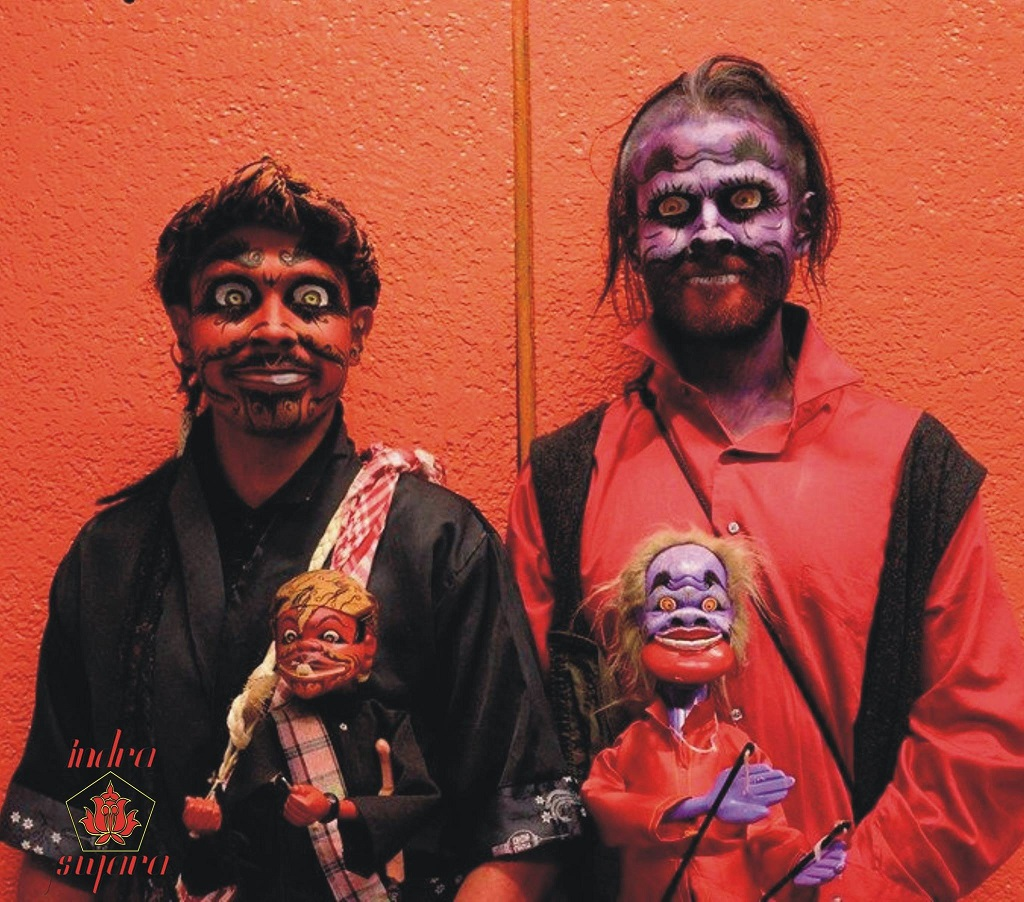 dalang, titiriteros del grupo Indra Swara